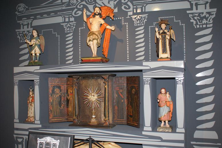 Imagenes en madera policromada de estilo Barroco Hispano Guaraní exhibidas en el interior del Museo de Arte Sacro de La Fundación Nicolás Darío Latourrette Bo